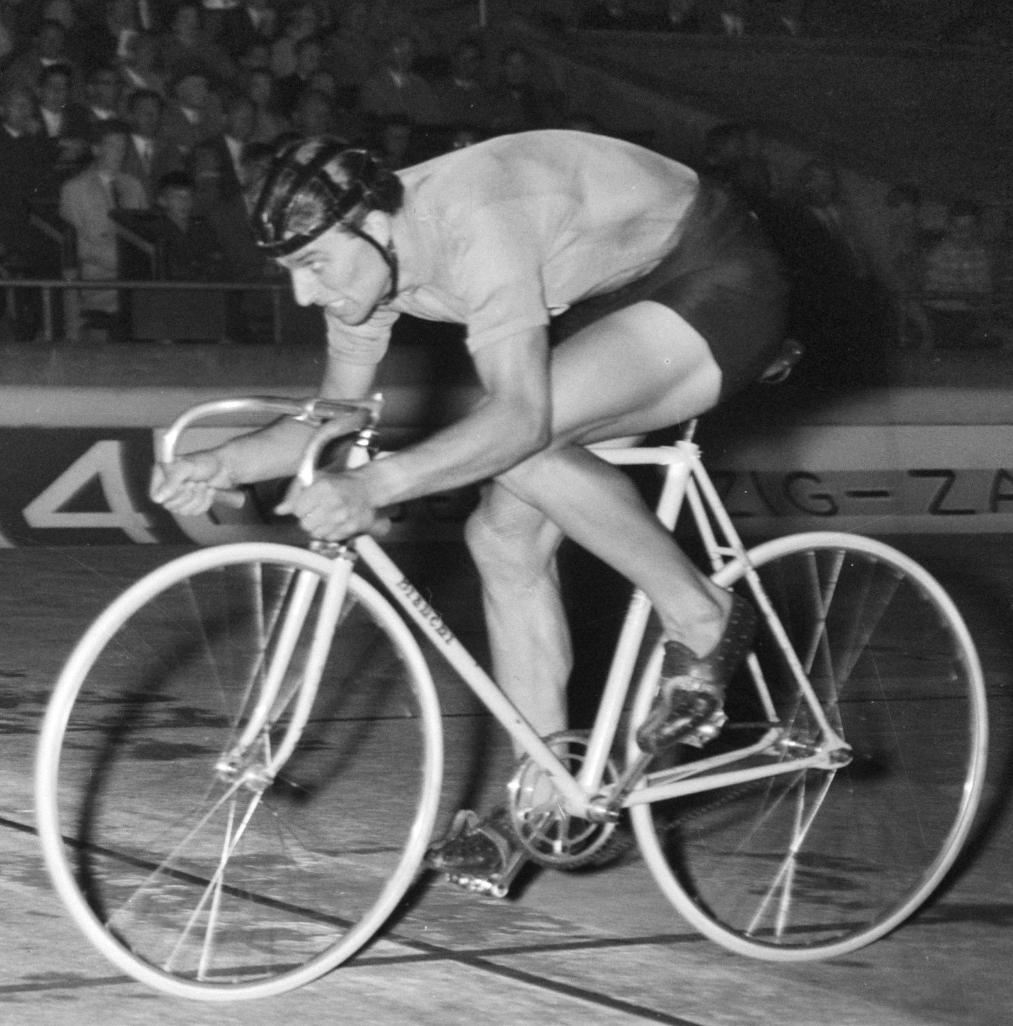 Wereldkampioenschap wielrennen op de baan in Amsterdam. Valotto (It.) tweede bij achtervolging amateurs